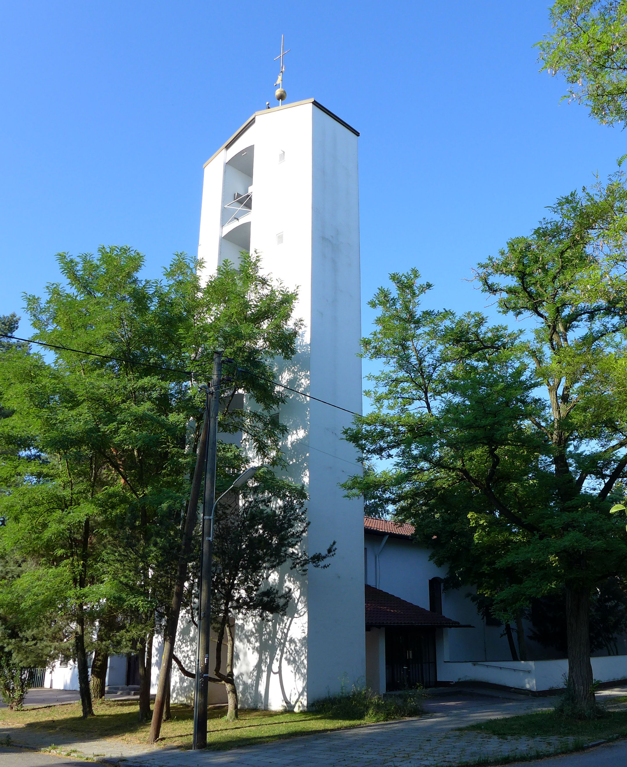 Bethlehemskirche München Untermenzing